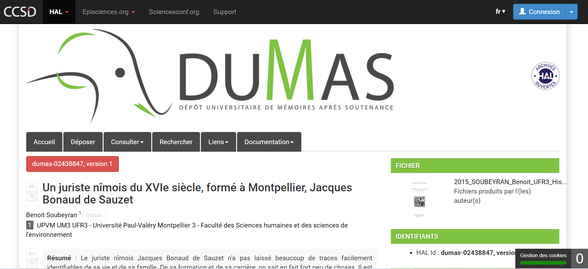 Capture d'écran de la plateforme de Dépôt Universitaire de Mémoires Après Soutenance (DUMAS). Mémoire de M2 de Benoit Soubeyran sur Jacques Bonaud de Sauzet